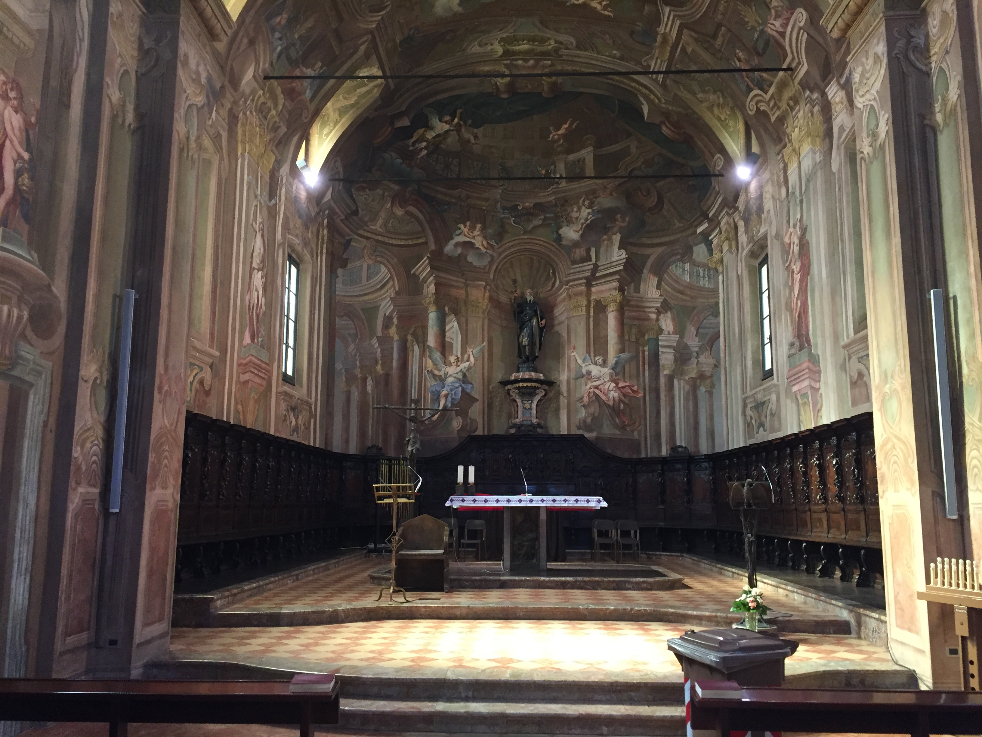 Interno chiesa di S. Antonio alla Motta, Varese, Italia